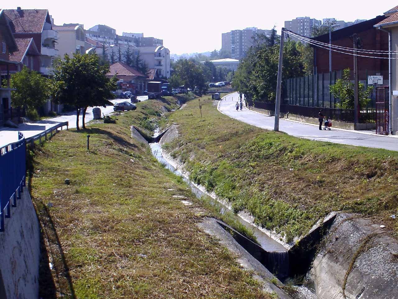 Srpskohrvatski / српскохрватски: Mirijevski potok u Mirijevu (Beograd), snimljen sa mosta u ulici Vitezova Karađorđeve zvezde u pravcu juga. Sa desne strane je OŠ Despot Stefan Lazarević (ex Rodoljub Čolaković), u pozadini se vide soliteri Mirijeva II ("Stojčino brdo").